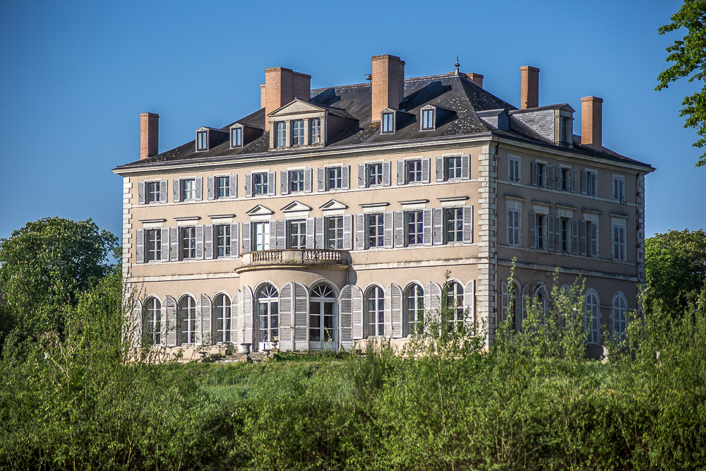 Château de la Barbée, Bazouges-sur-le-Loir (Sarthe) France